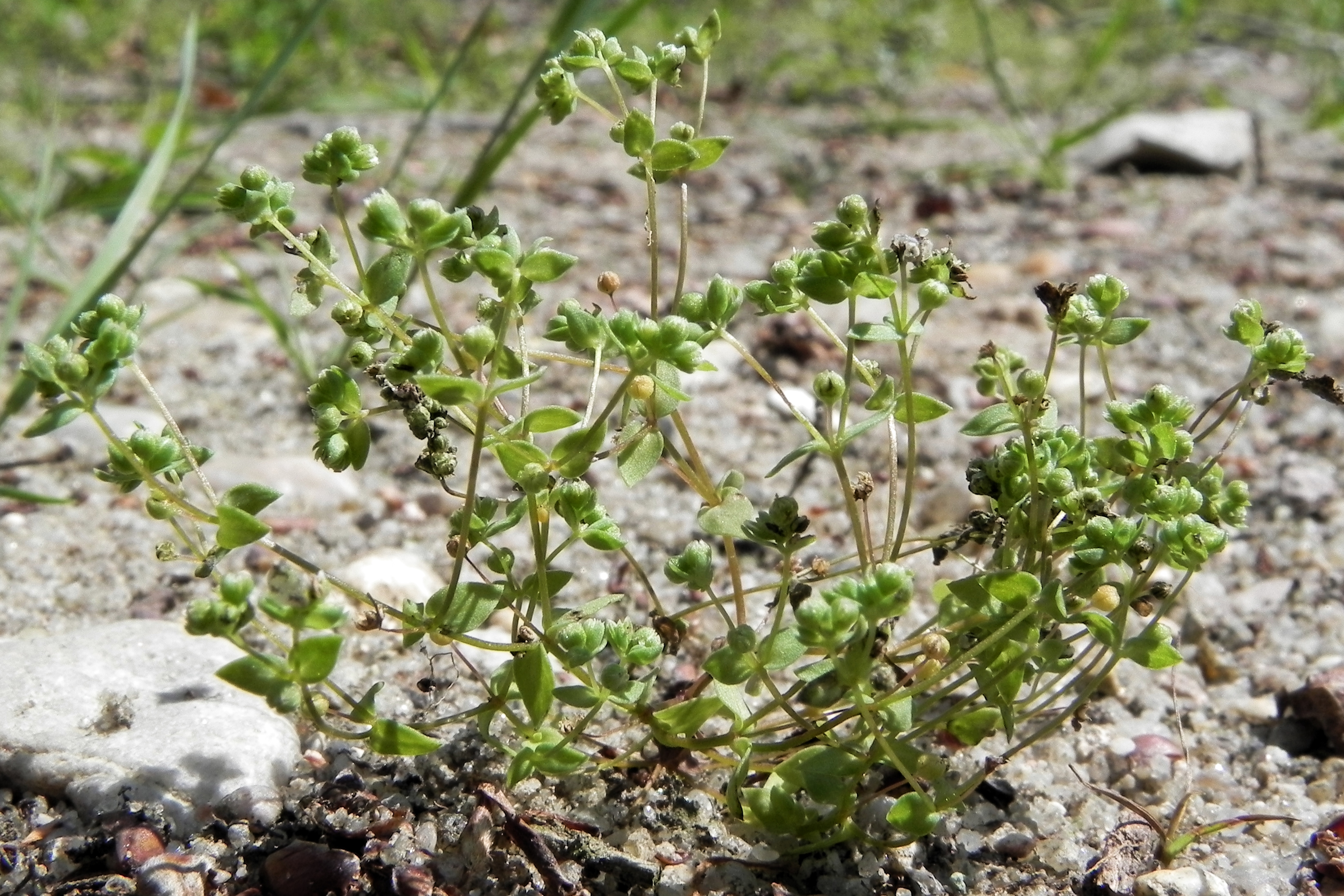 Zwerglein (radiola linoides) im Naturpark Südheide (Germany)